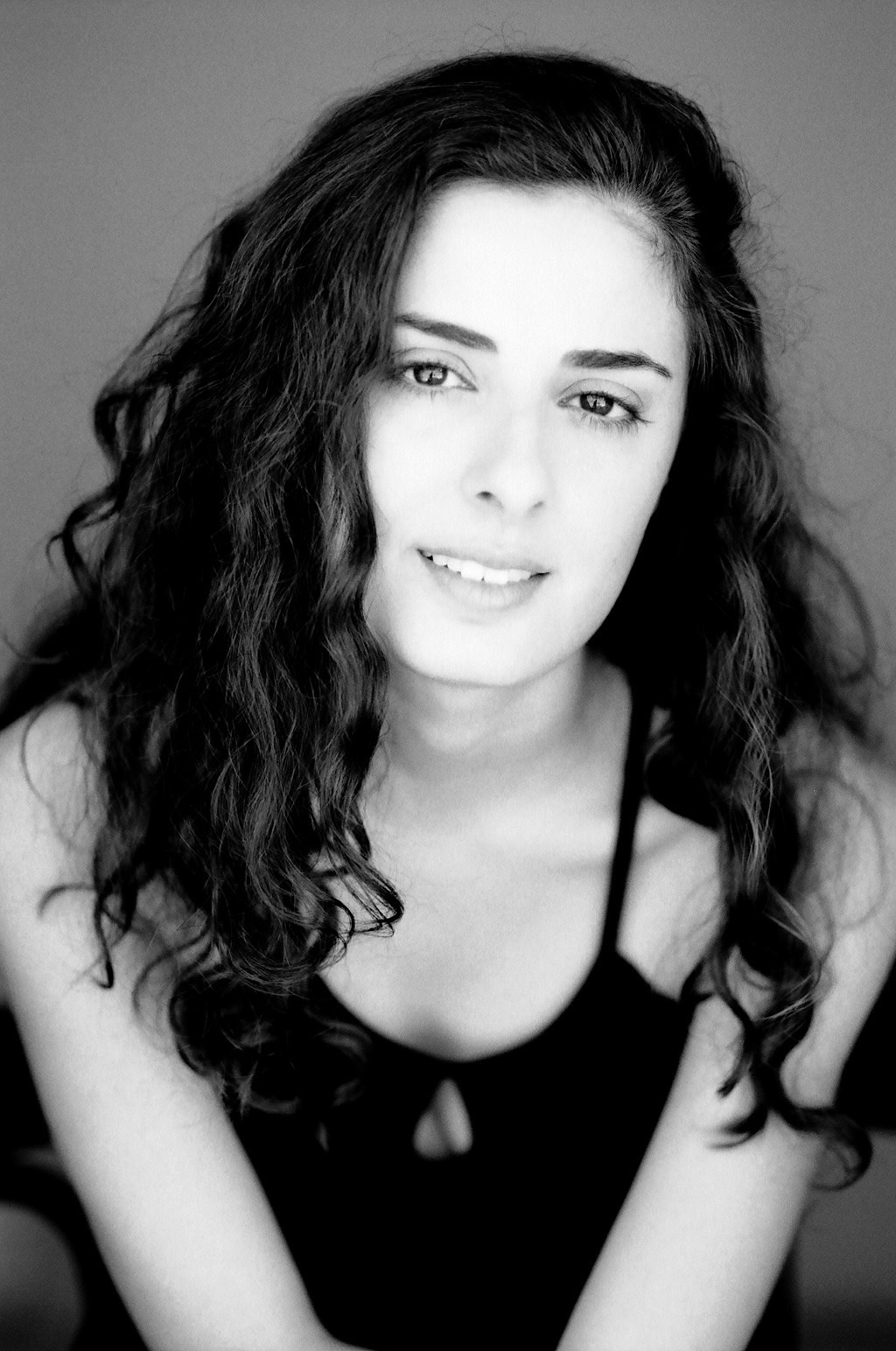 יפית אסולין